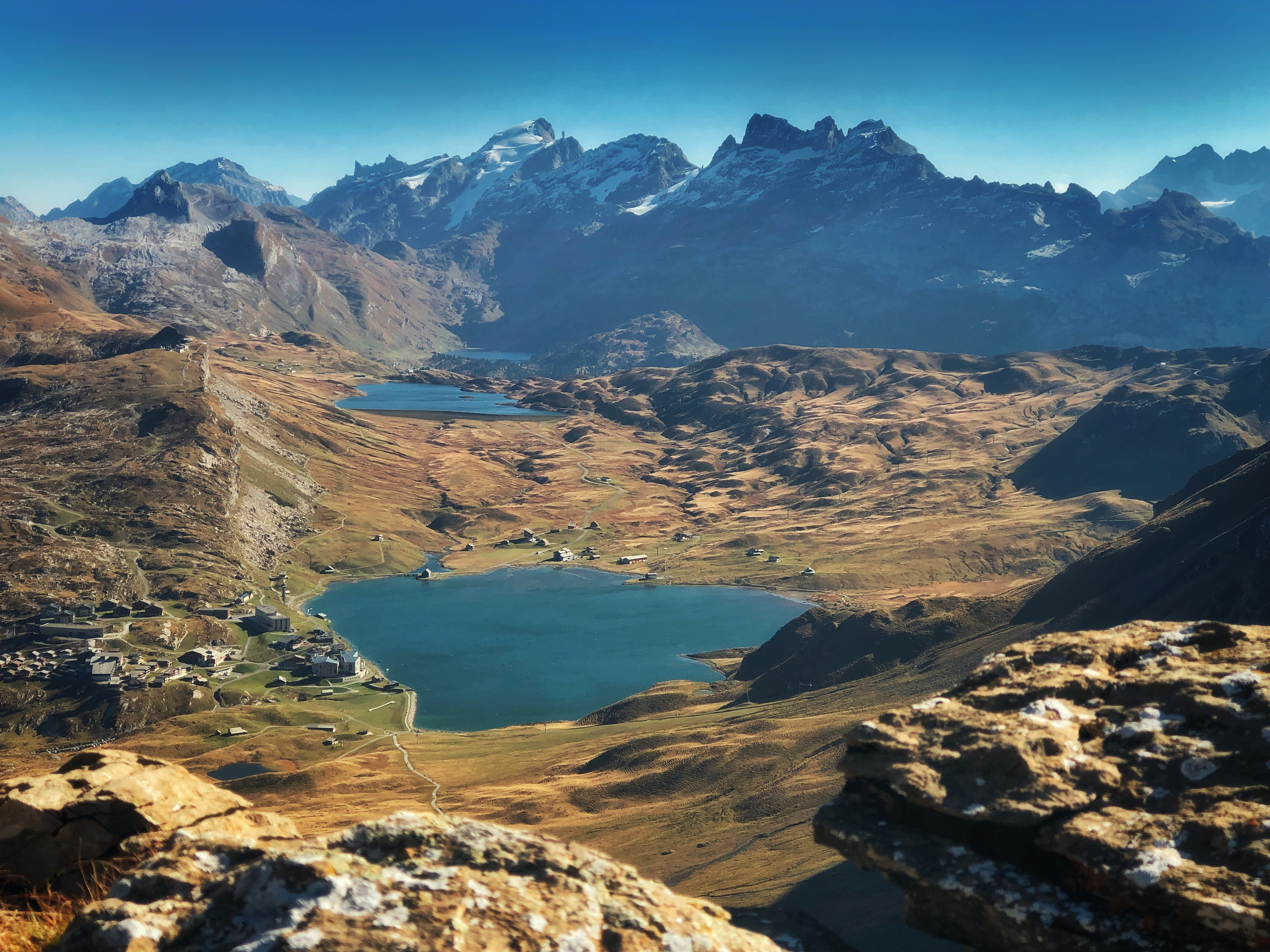 Überblick auf die Melchsee-Frutt vom Hochstollen aus gesehen.